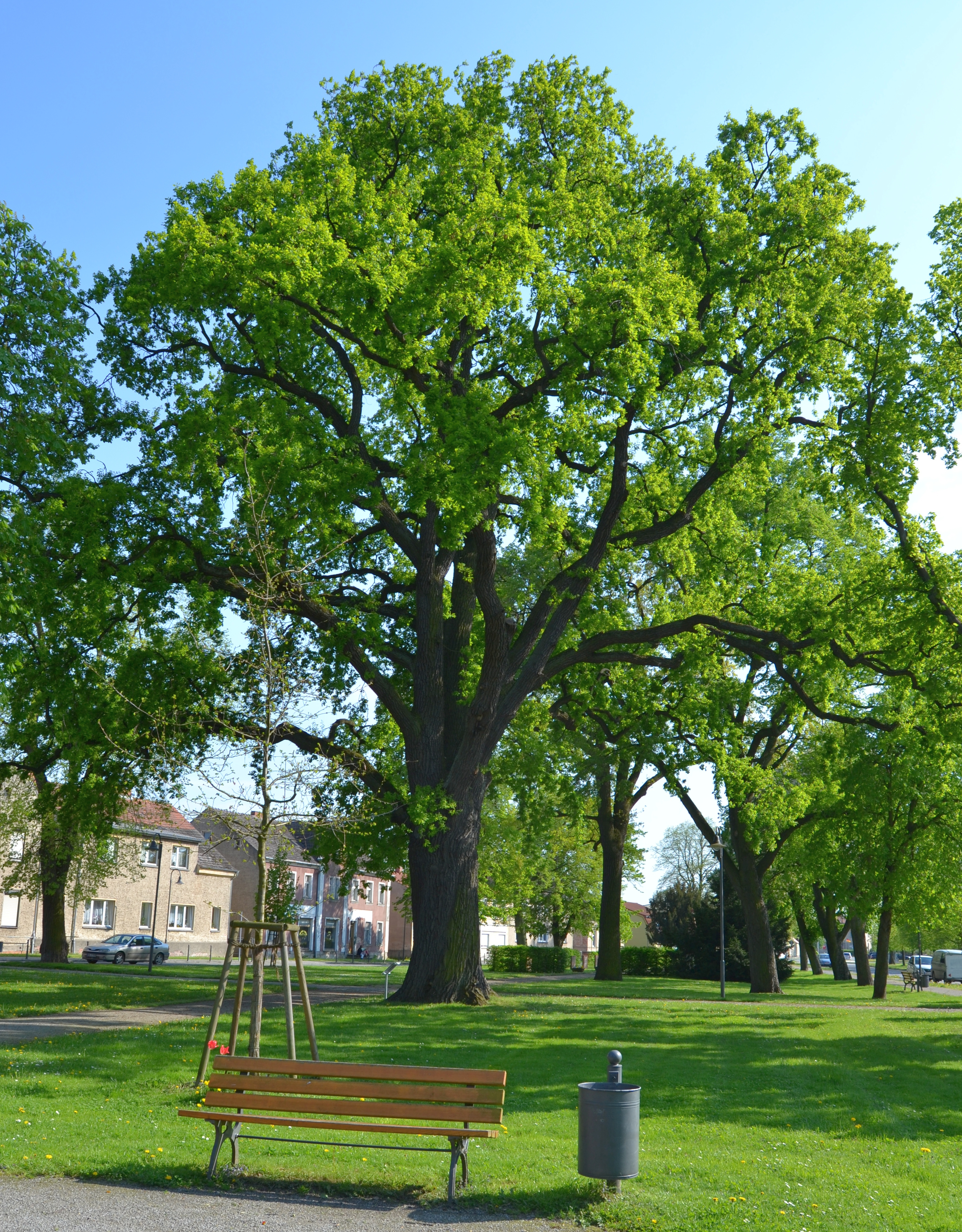 Gedächtnis- und Friedenseiche in Letschin, 1814 in Gedenken an die Letschiner Opfer der Befreiungskriege vom Ortspfarrer gepflanzt; Naturdenkmal.